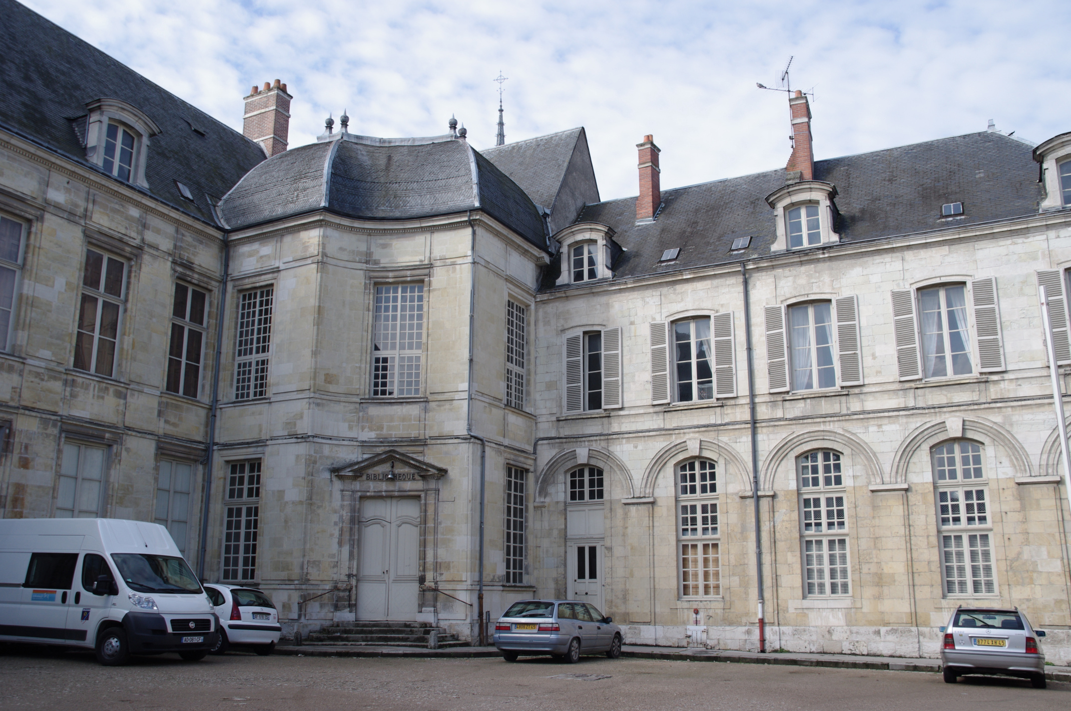 Ancien évêché d'Orléans, ayant abrité la bibliothèque de quartier Bourgogne, rue Dupanloup, Orléans, Loiret, France